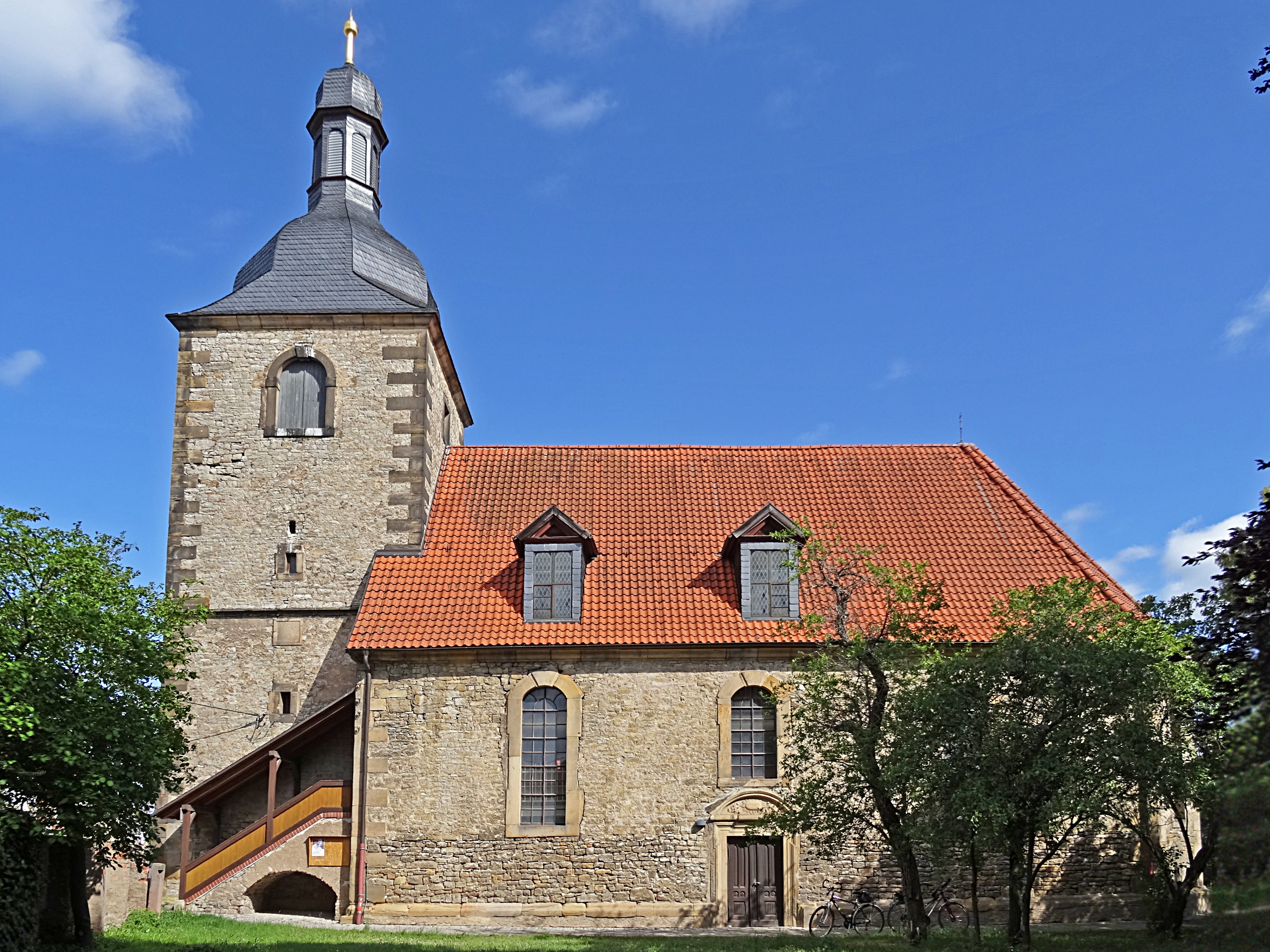 Südansicht der Kirche zur Himmelspforte in Kühnhausen